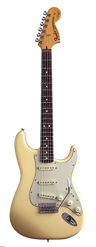 Yngwie Malmsteen's electric guitar